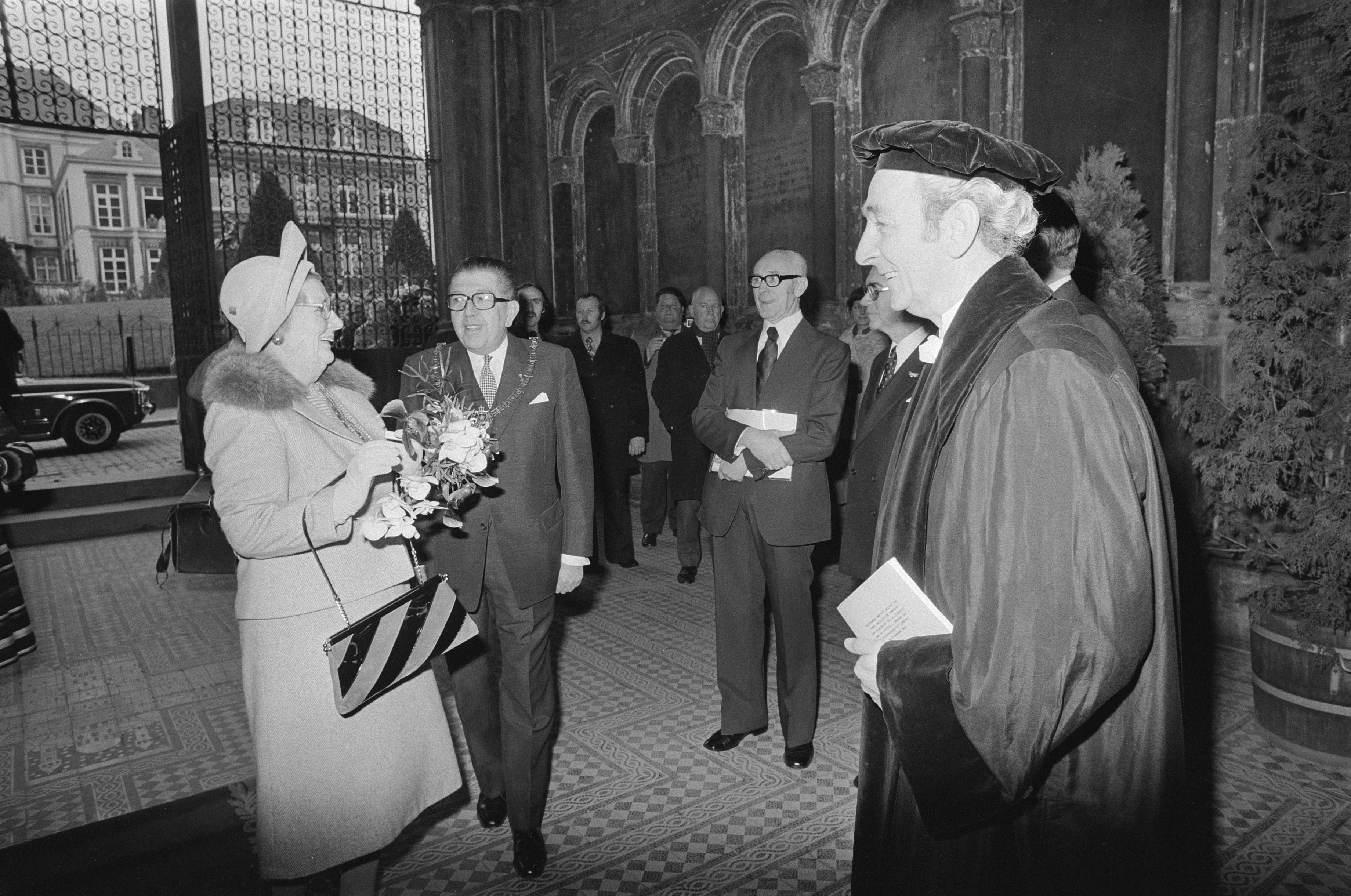 Collectie / Archief : Fotocollectie Anefo Reportage / Serie : [ onbekend ] Beschrijving : Hare Majesteit opent Rijksuniversiteit in Maastricht; v.l.n.r. koningin Juliana, dr. J.G.H. Tans, minister Van Kemenade, prof.dr. Tiddens en staatssecretaris Klein Datum : 9 januari 1976 Locatie : Limburg, Maastricht Trefwoorden : koninginnen, ministers, openingen, staatssecretarissen, universiteiten Persoonsnaam : Juliana (koningin Nederland), Kemenade, Jos van, Tans, J.G.H. Fotograaf : Mieremet, Rob / Anefo Auteursrechthebbende : Nationaal Archief Materiaalsoort : Negatief (zwart/wit) Nummer archiefinventaris : bekijk toegang 2.24.01.05 Bestanddeelnummer : 928-3536